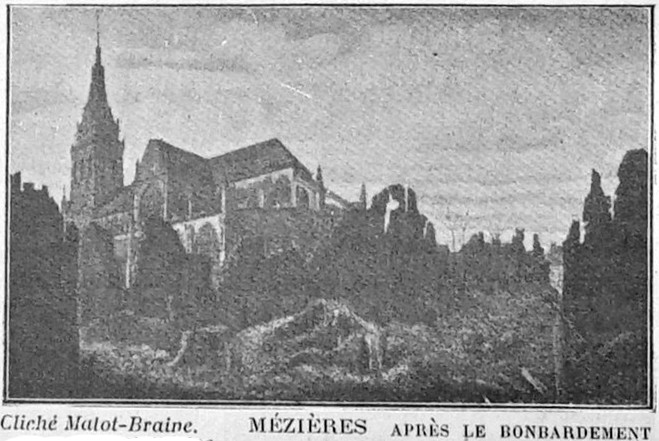 publié vers 1900.